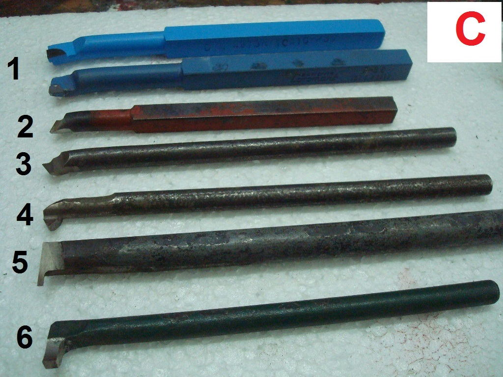 Outils de tour pour usinage interne